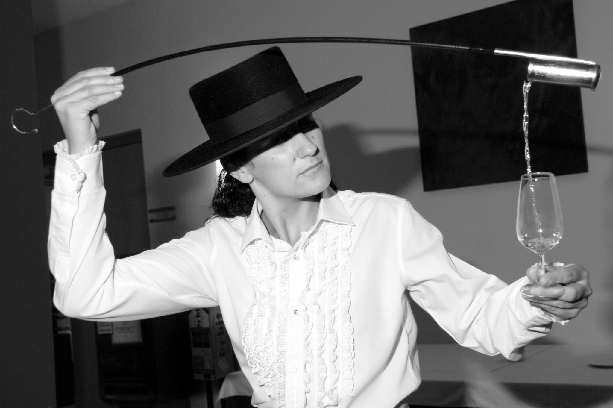 Venenciadora using a venencia to pour Sherry into a copita